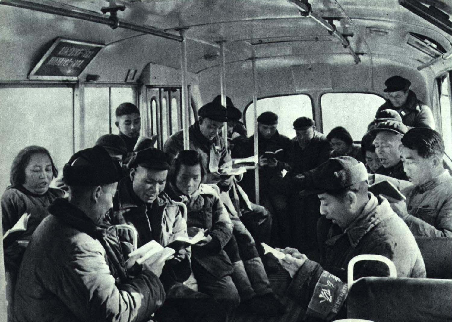 1967-04 1967年上海公共汽车公司